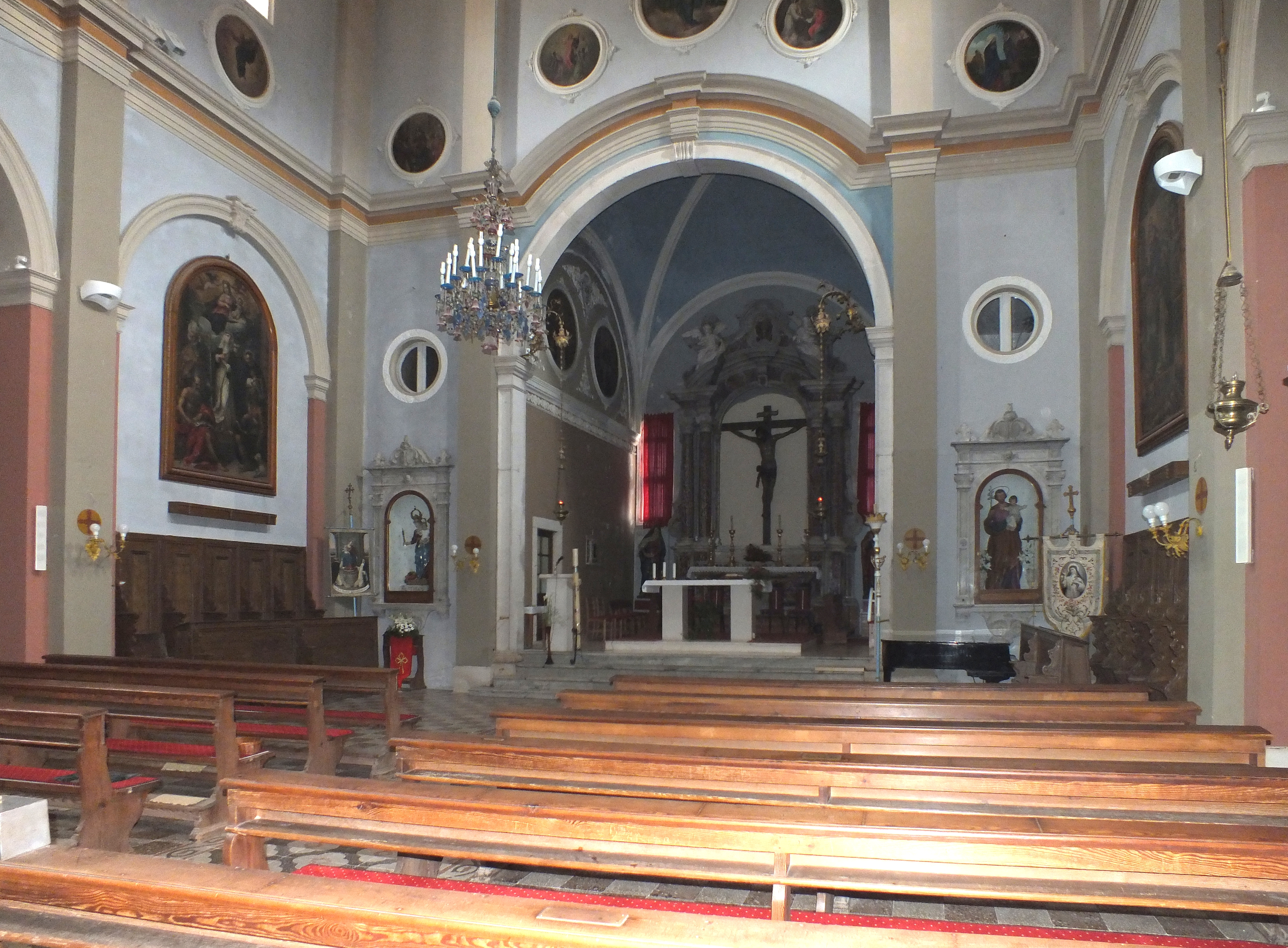 Stari Grad, Kirche St. Peter und Dominikanerkloster